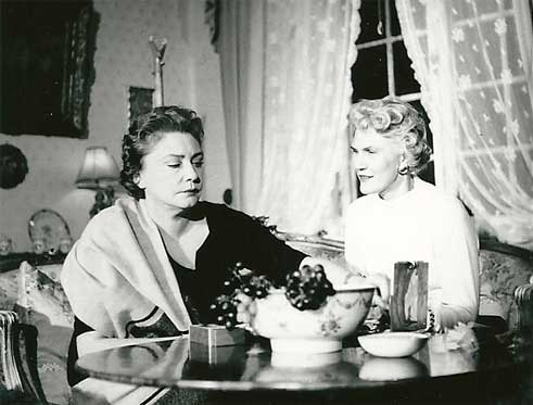 Åsa Holmsen intervjuvar Zarah Leander hemma hos Zarah.